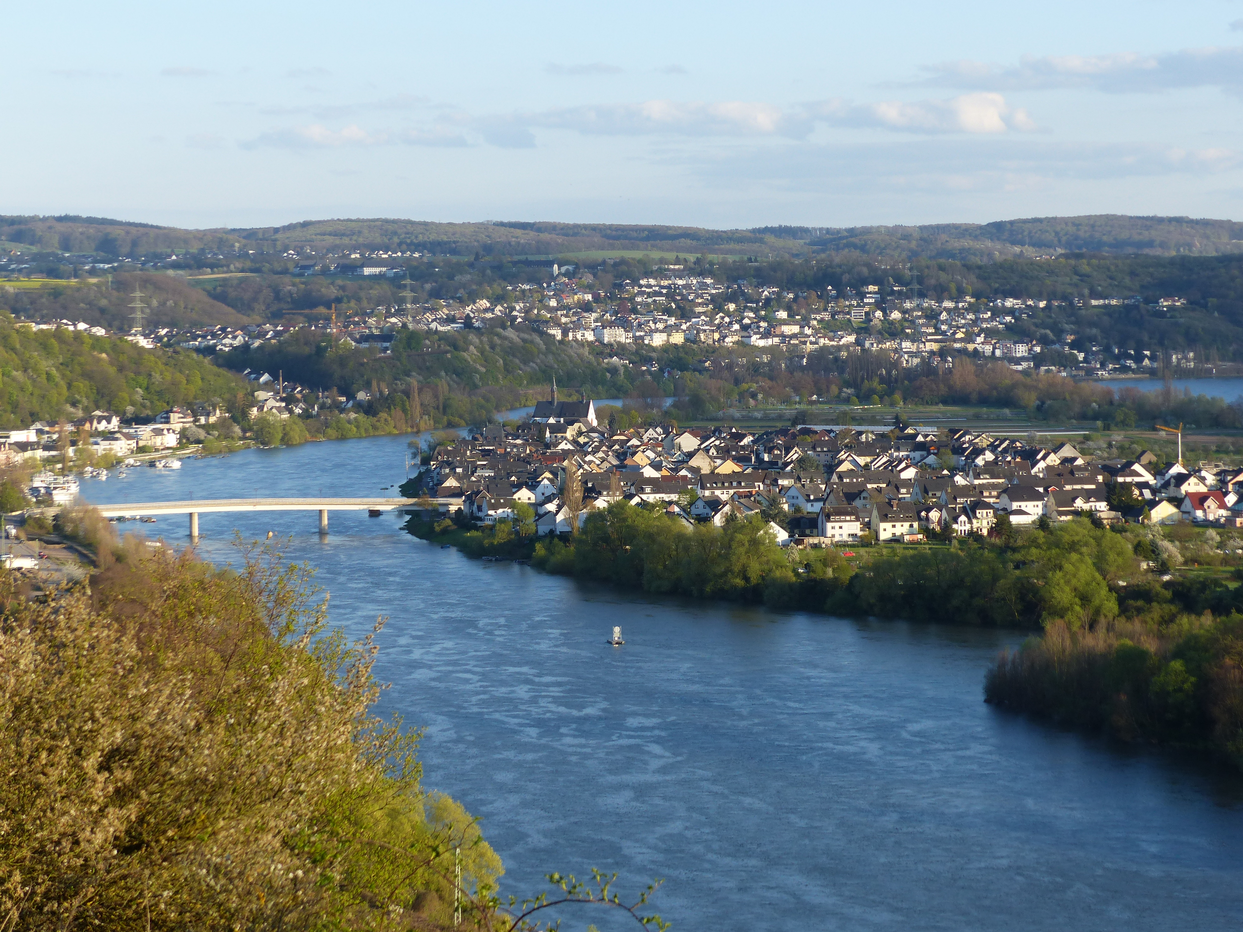 Die Rheininsel Niederwerth mit dem gleichnamigen Ort (vorne rechts Graswerth). Block vom Parkplatz „Auf der Zeg“ der A 48